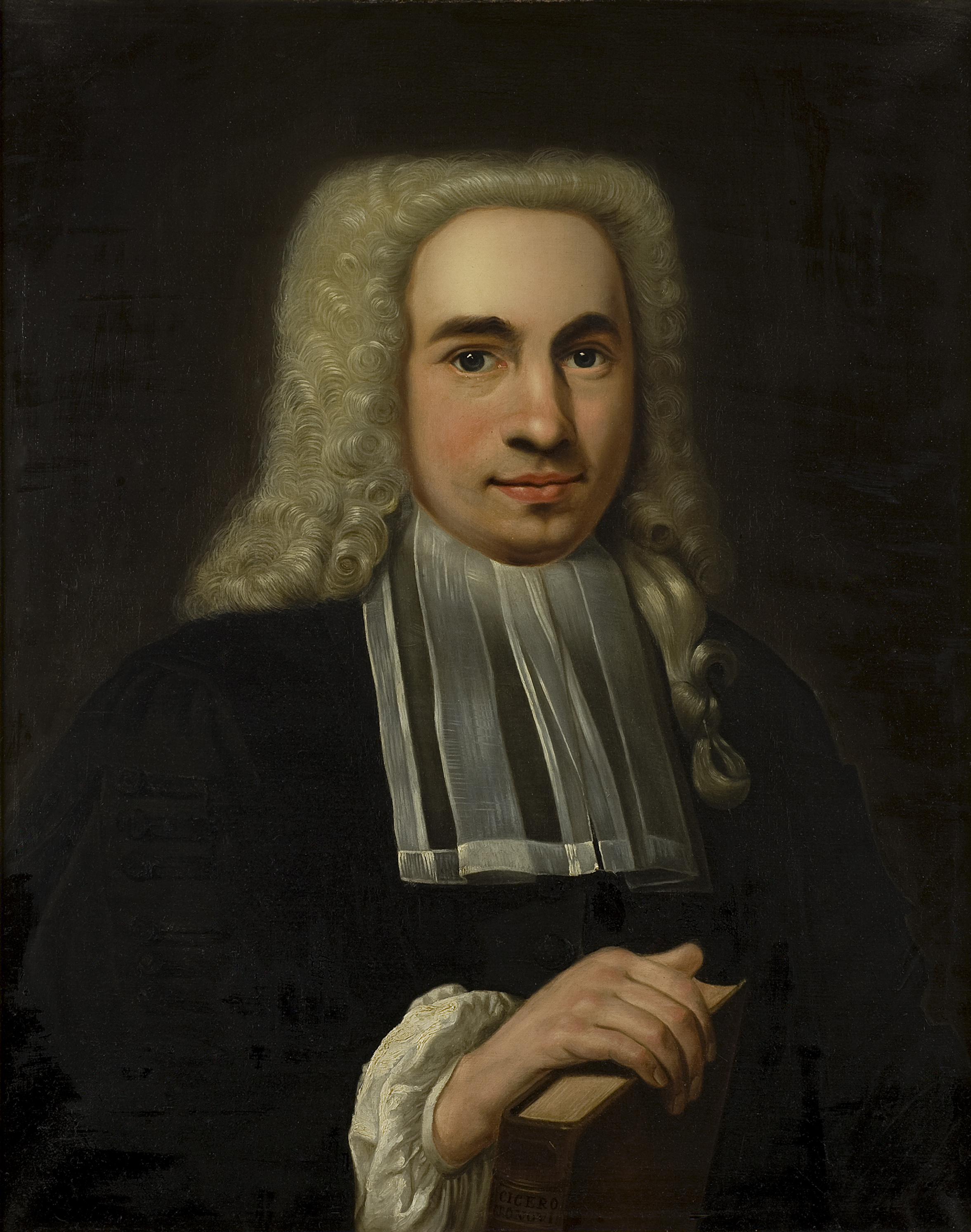 Leonardus Offerhaus geschilderd in 1860 door Sloterdijck naar een schilderij van Jan Abel Wassenbergh